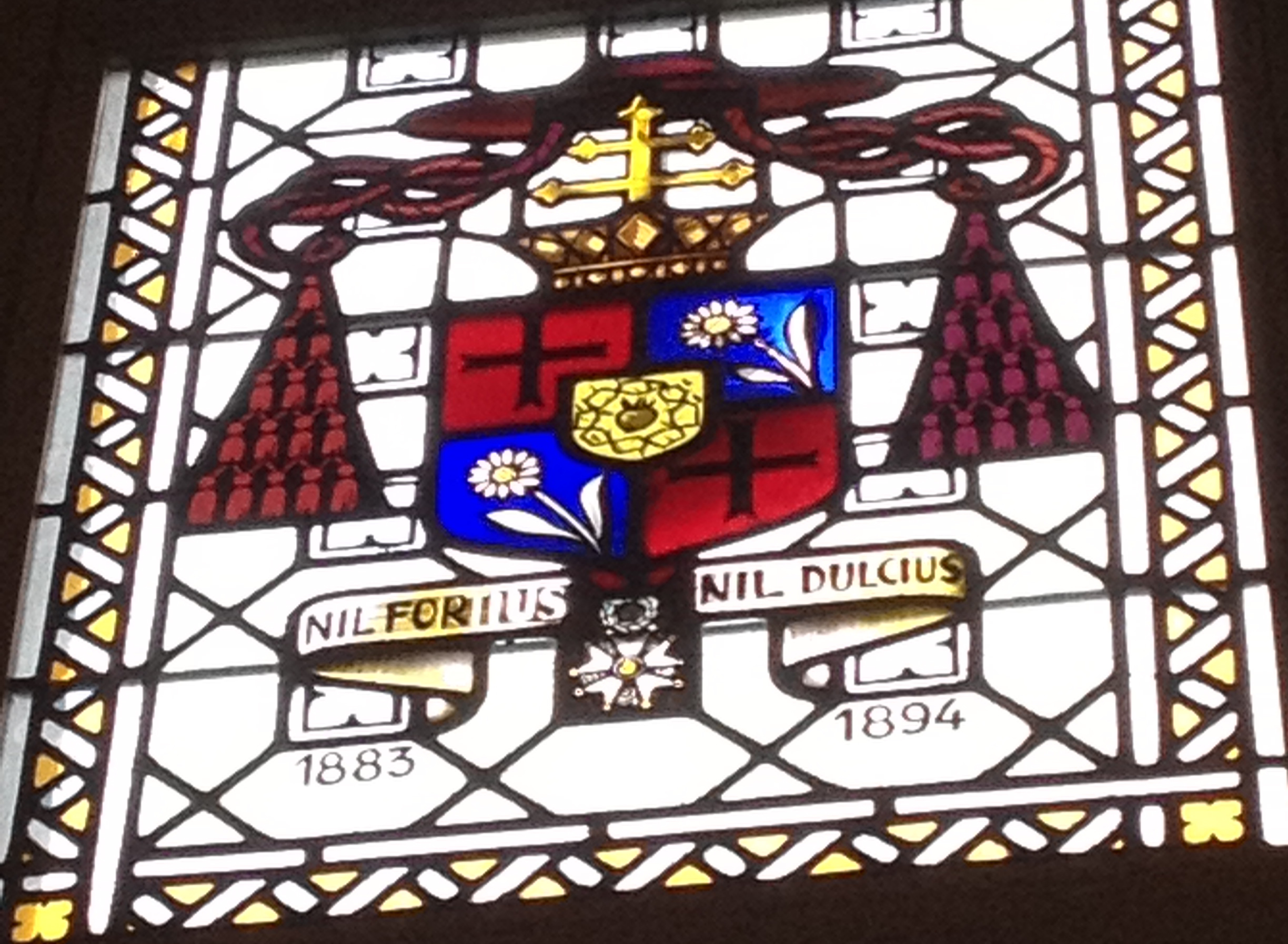 Armoiries en vitrail de Léon-Benoit-Charles Thomas, dans la salle des États de l'archevêché.